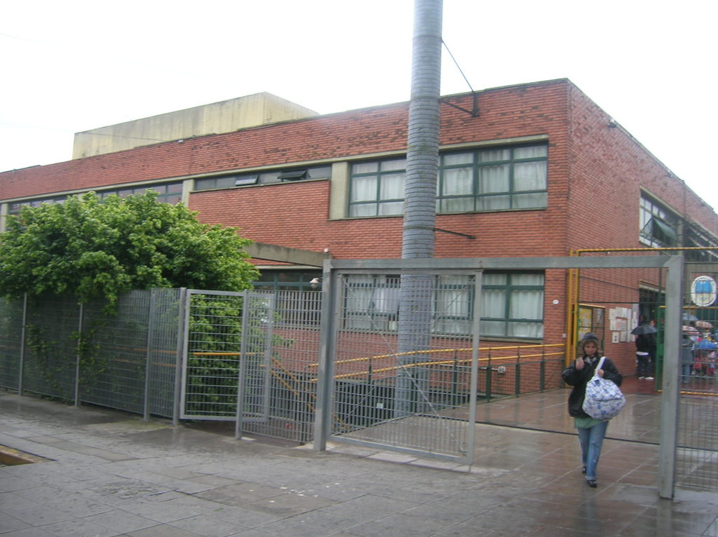 Foto de la Escuela Primaria Común Nº 15 “Provincia de Santa Fe”. Pico 2689. Saavedra, Buenos Aires.